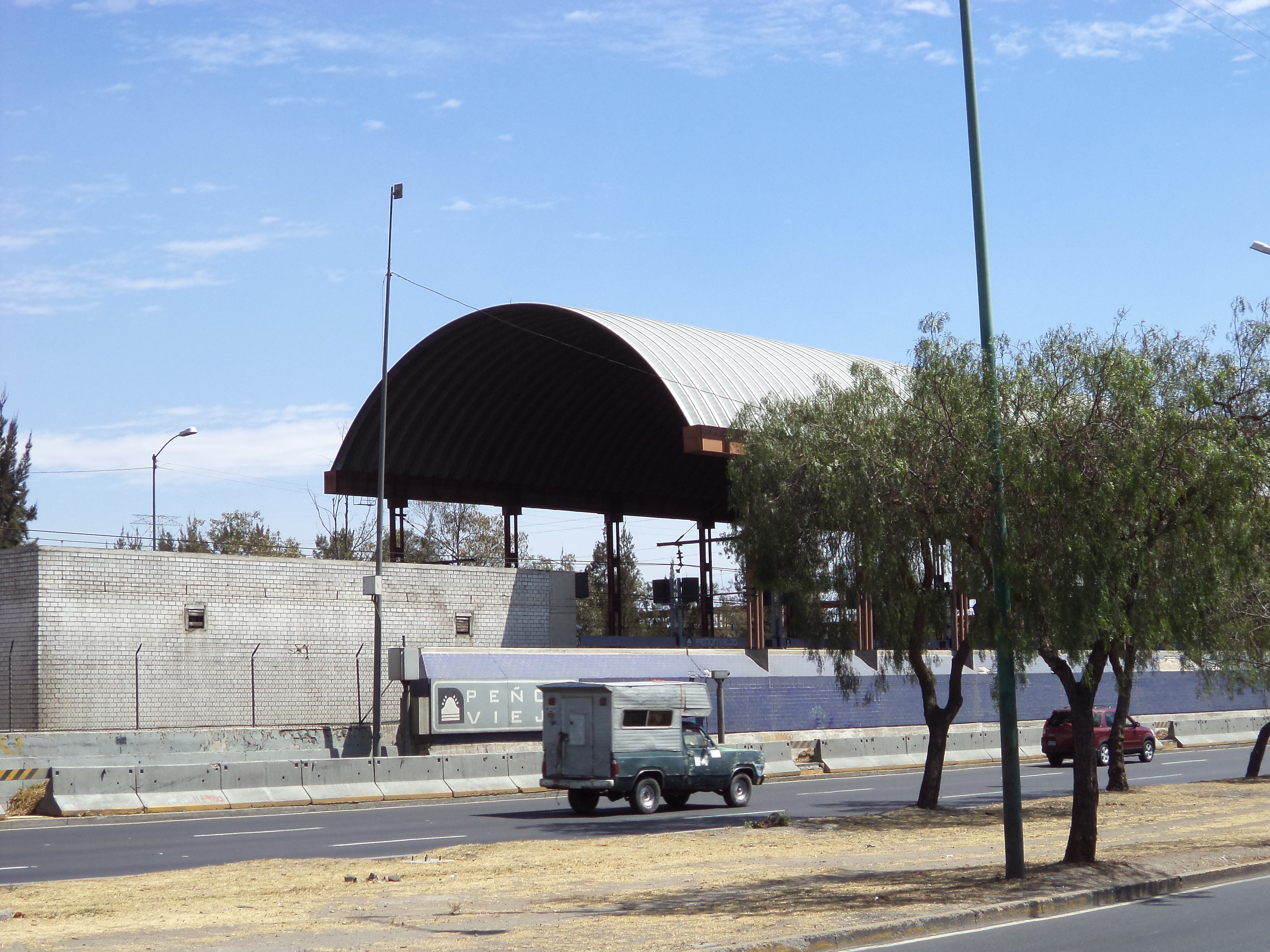 Estacion Peñon Viejo